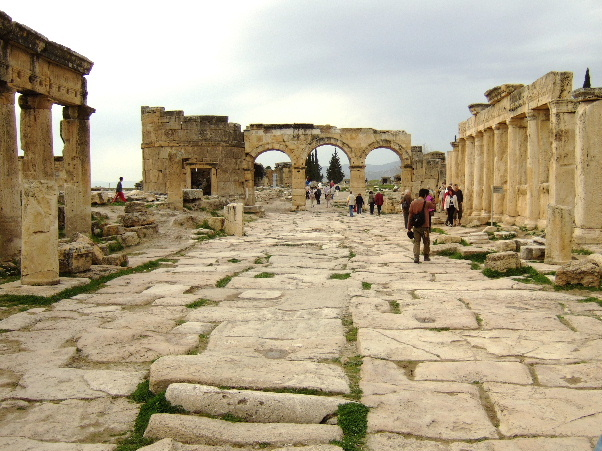 Hierapolis: Hauptstraße, Latrine (rechts) und Nordtor